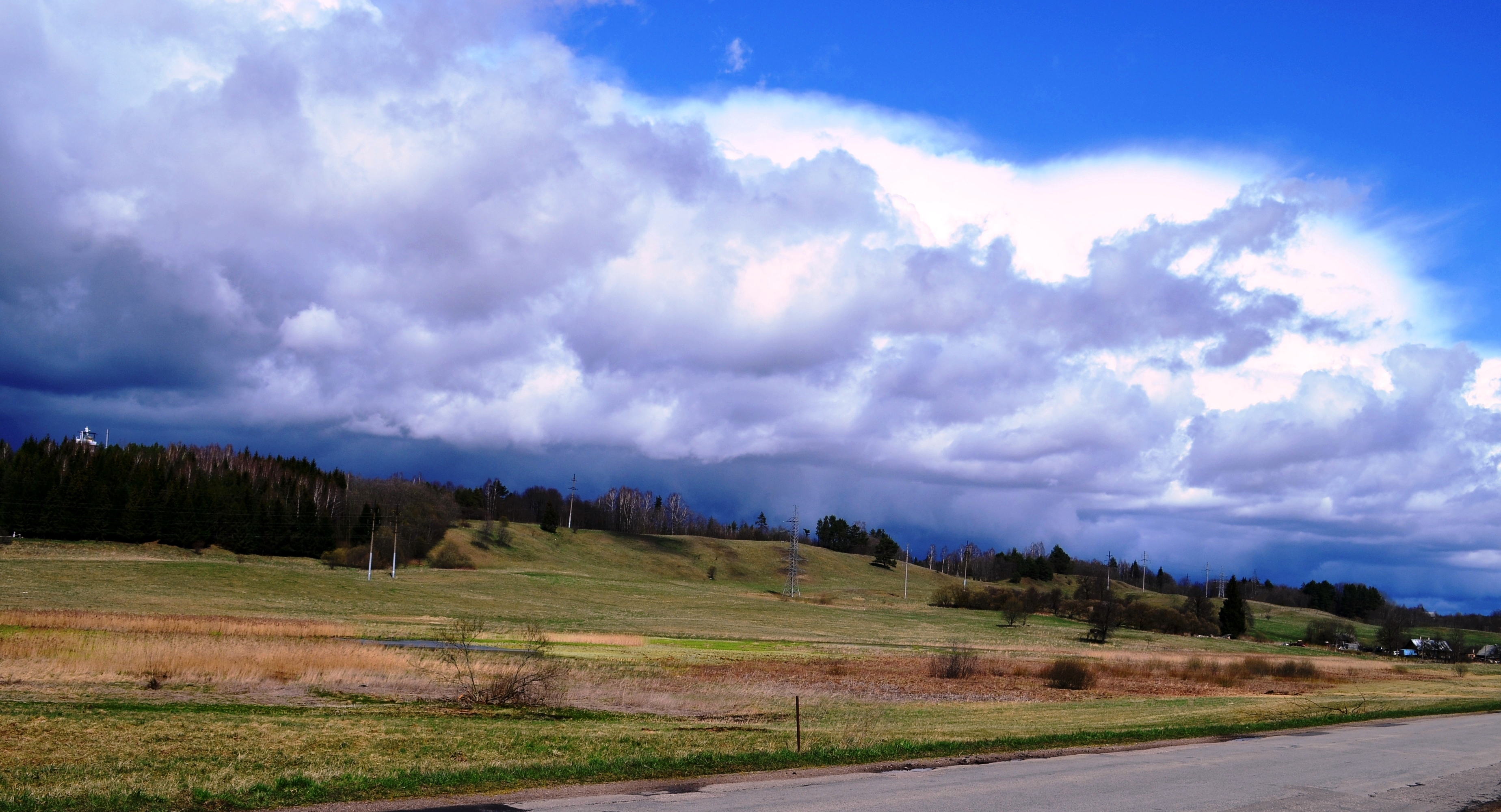 Debesys verčiasi per Riešės aukštumą, Žem. Rusokų k., Vilniaus raj.